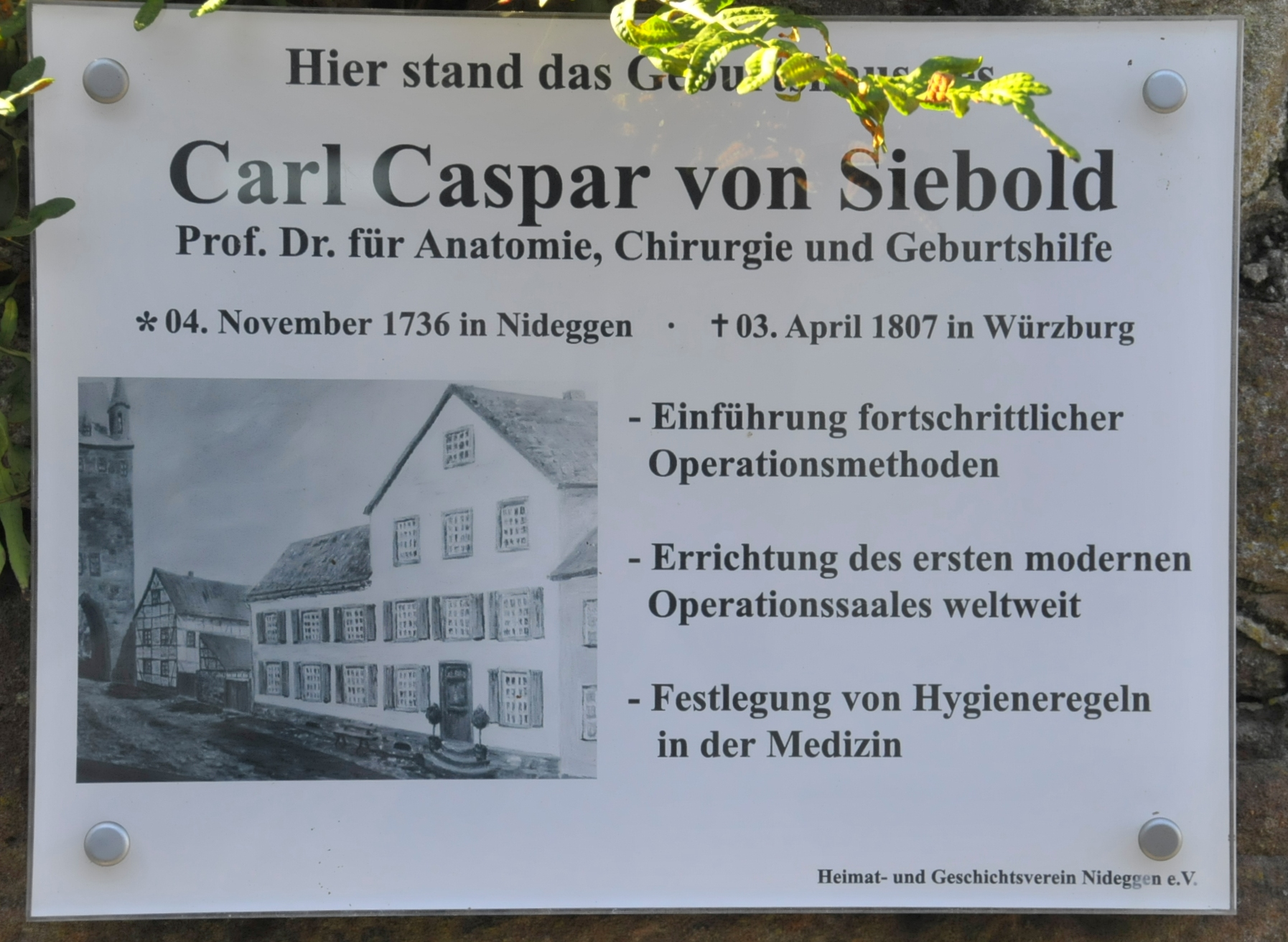 Gedenktafel in Nideggen an der Stelle des Geburtshauses von Carl Caspar von Siebold